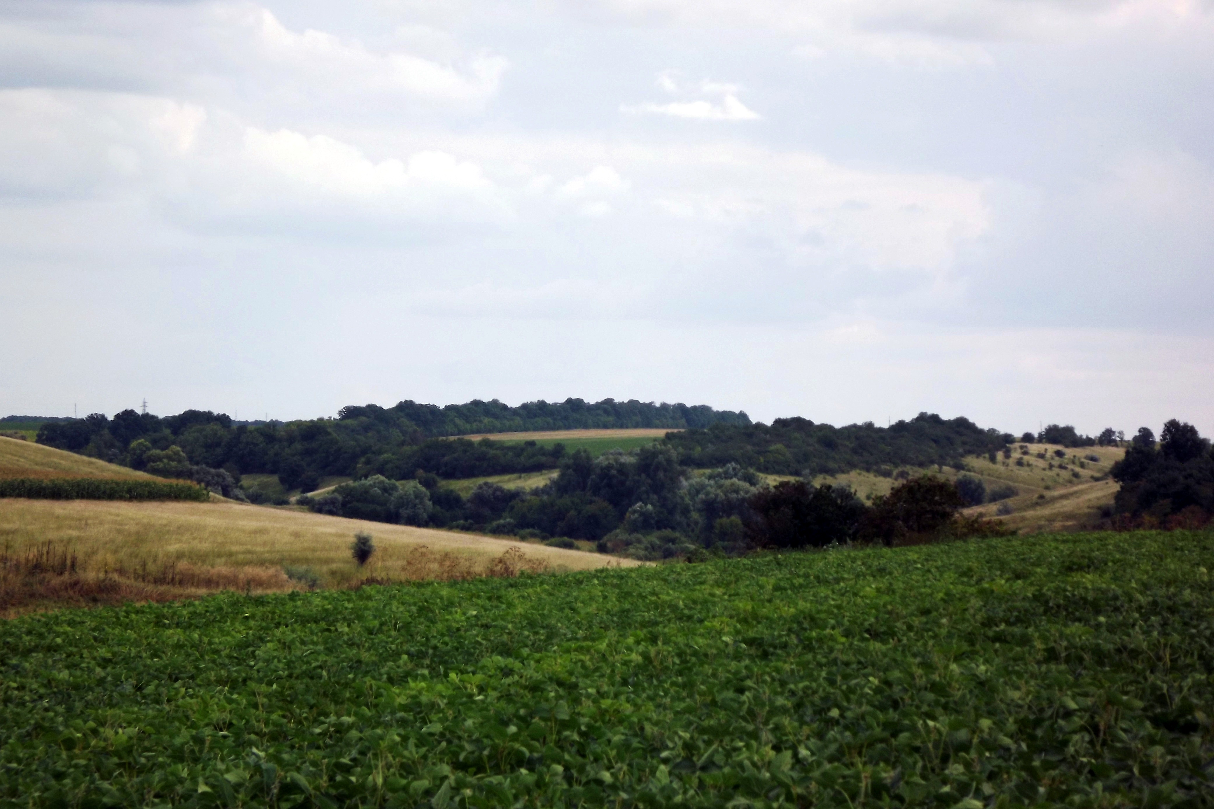 Матвіїв Яр біля Новомиргорода (Кіровоградська область), липень 2013